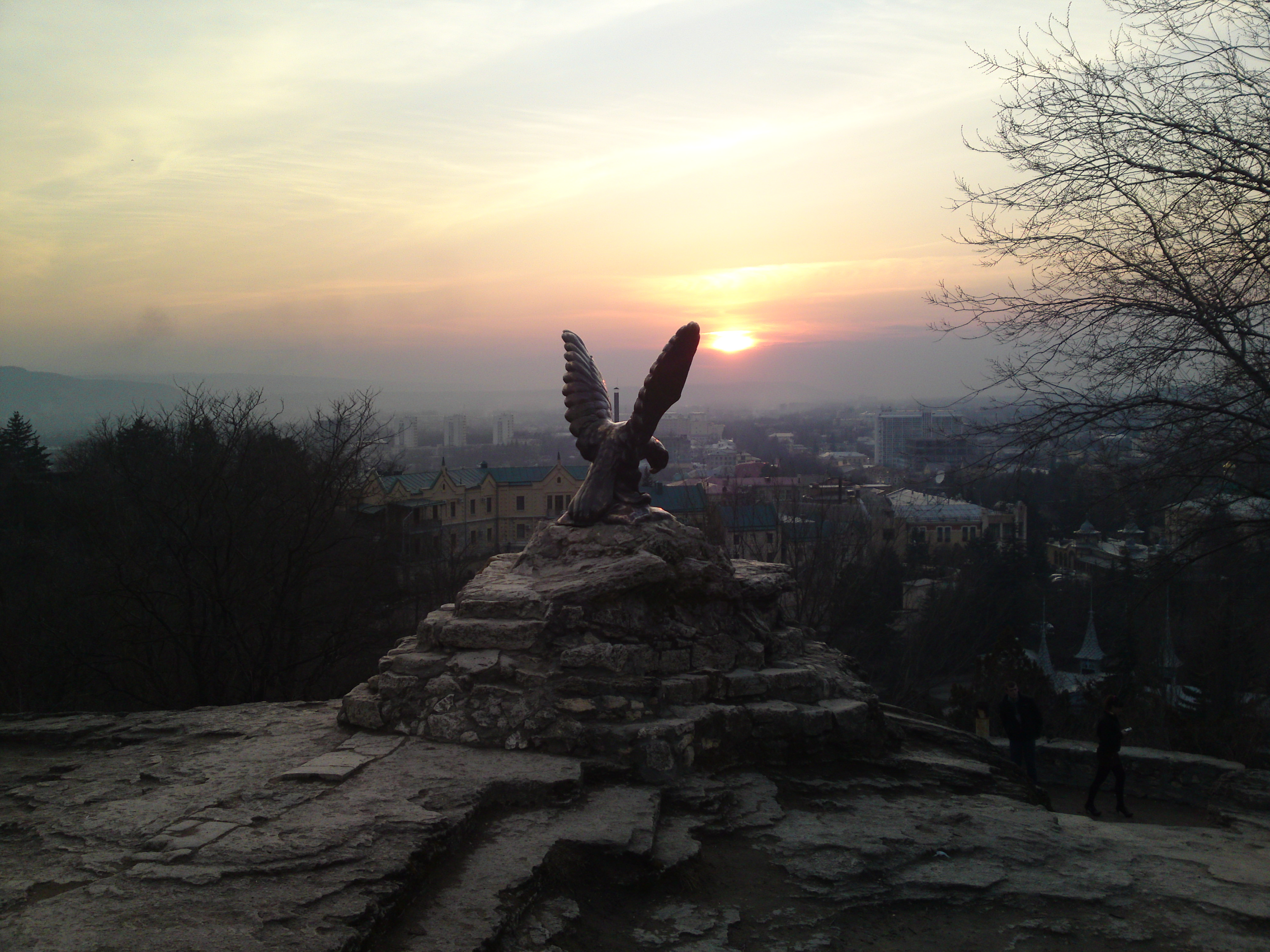 Располагается на горе Горячей